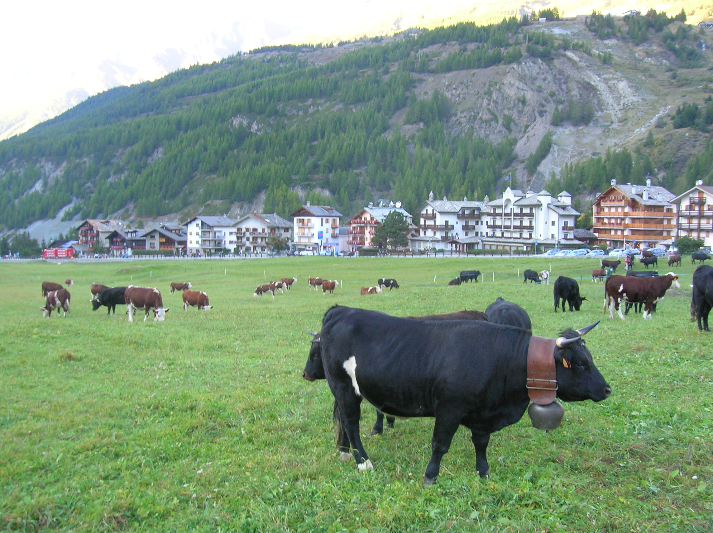 Mucche scese dall'alpeggio ora sui prati di Sant'Orso. Devétéya é Féra (Festa della desarpa, ossia della discesa dagli alpeggi con le mandrie). 1 ott 2011, Cogne, Valle d'Aosta, Italia.